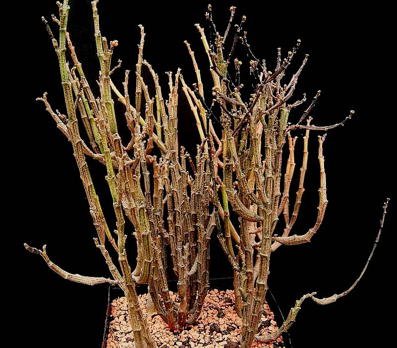 Euphorbia platyclada var. platyclada